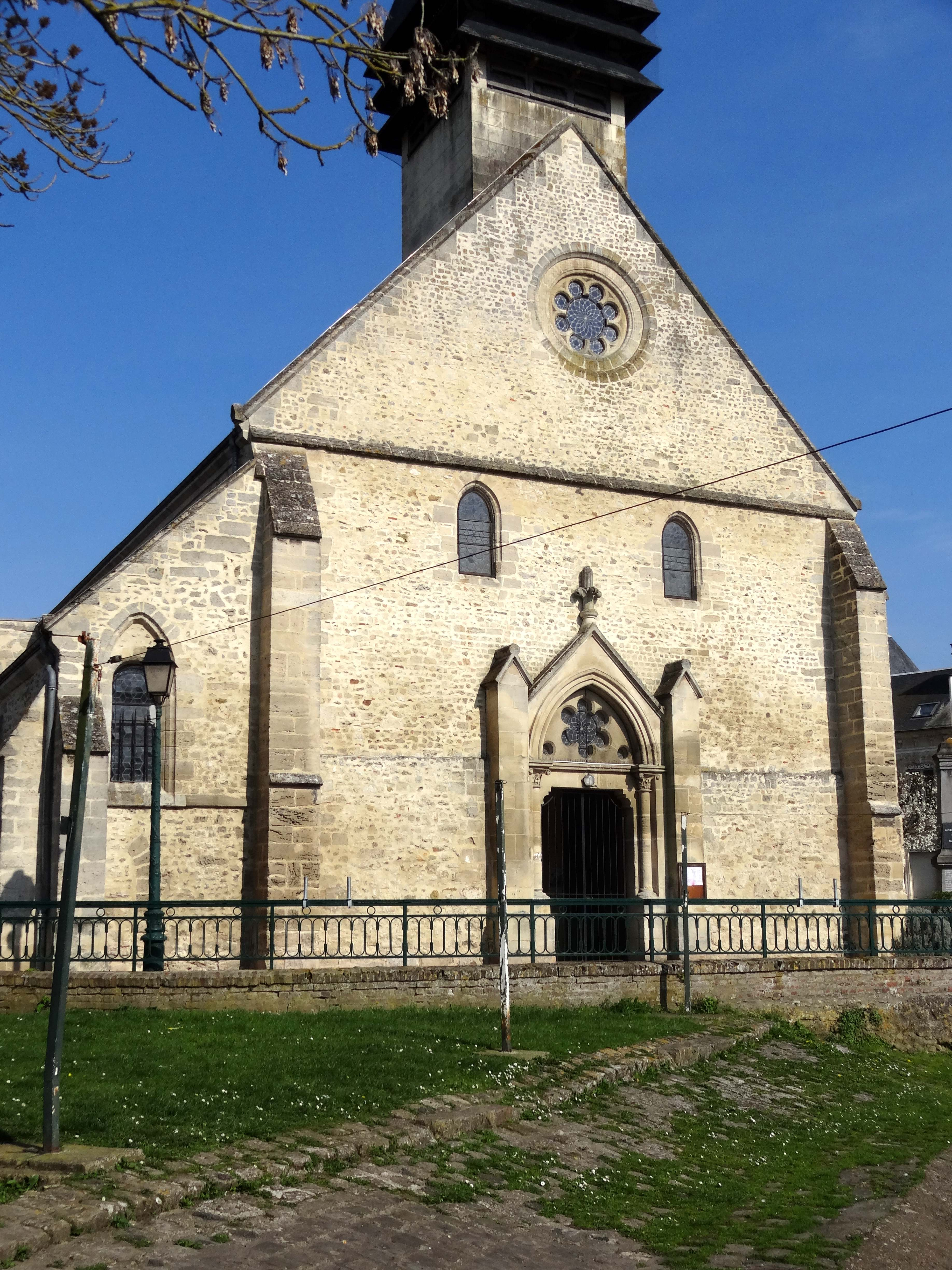 Église Saint-Vincent d'Hermes - voir titre.